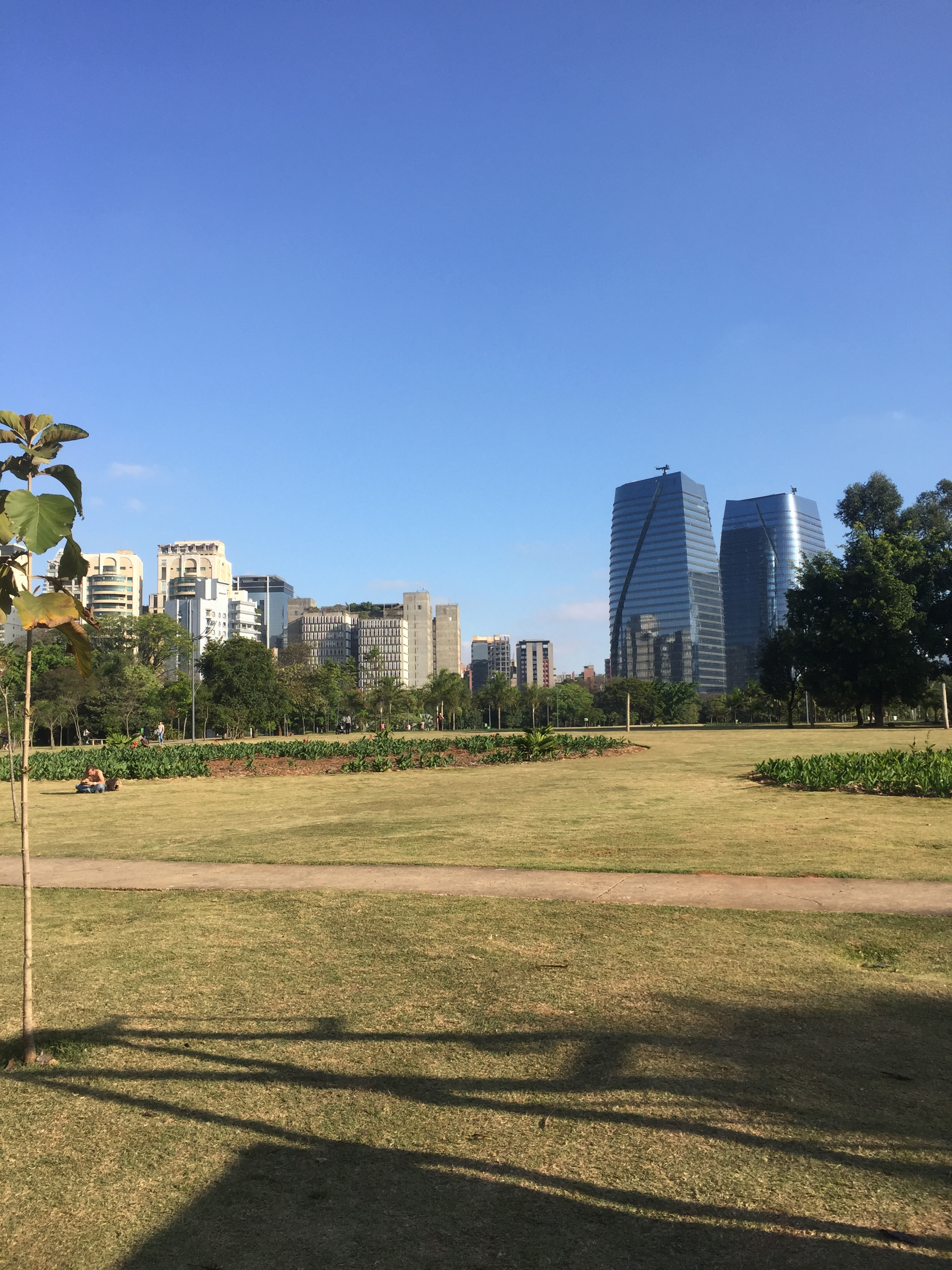 Visão ampla norte Parque do Povo